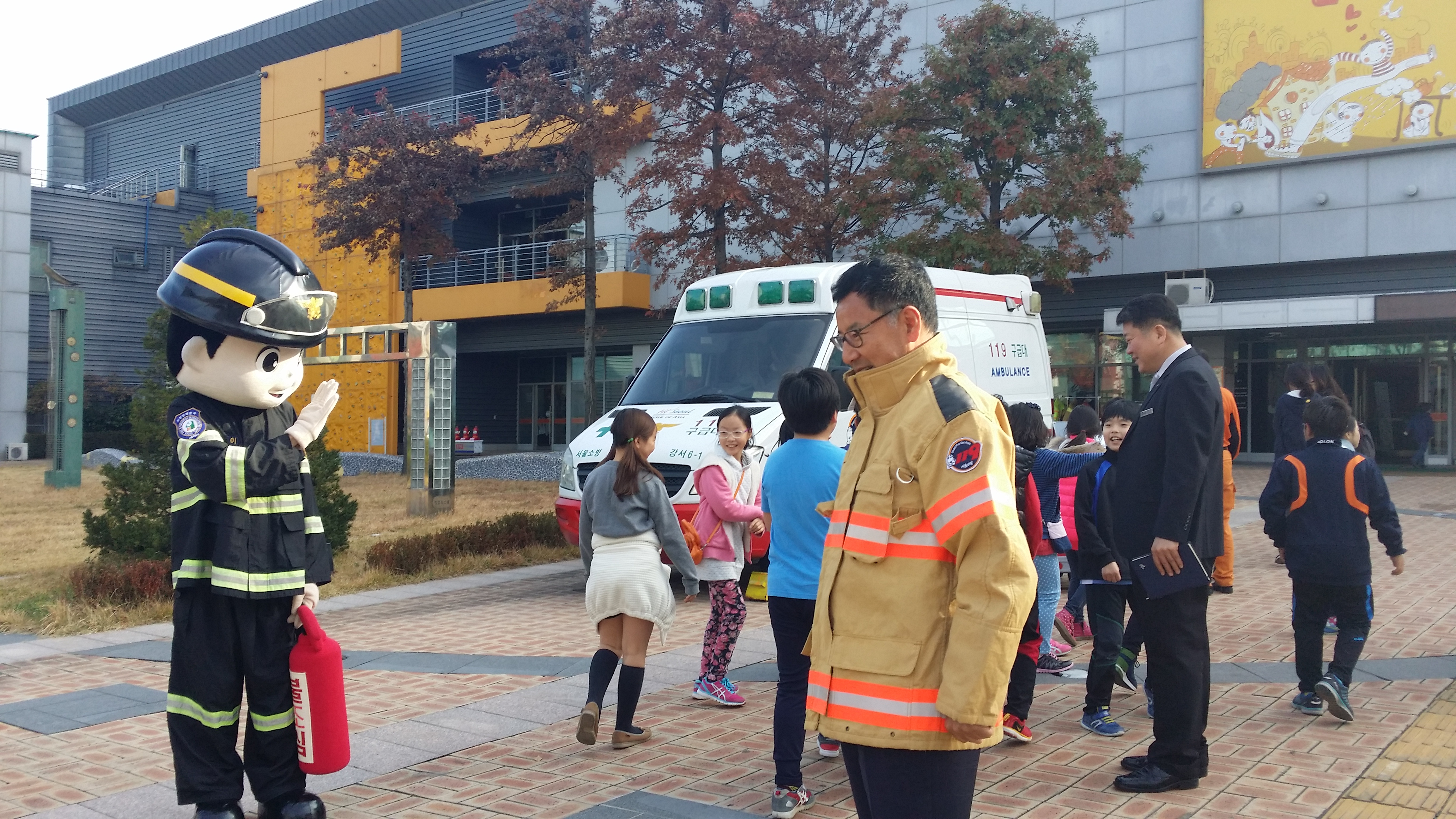 강감창 서울시의회 부의장 광나루안전체험관 방문